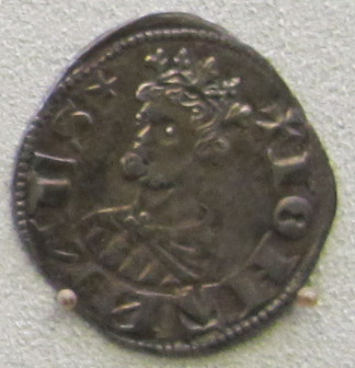 Cremona, giovanni di boemia, 1330-35